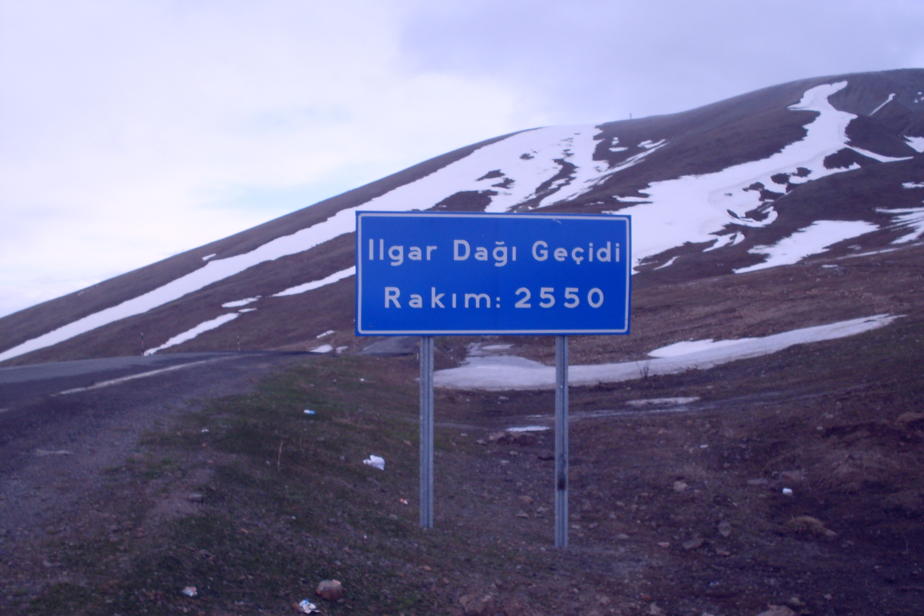 ILGAR DAĞI GEÇİDİ - POSOF ardahan